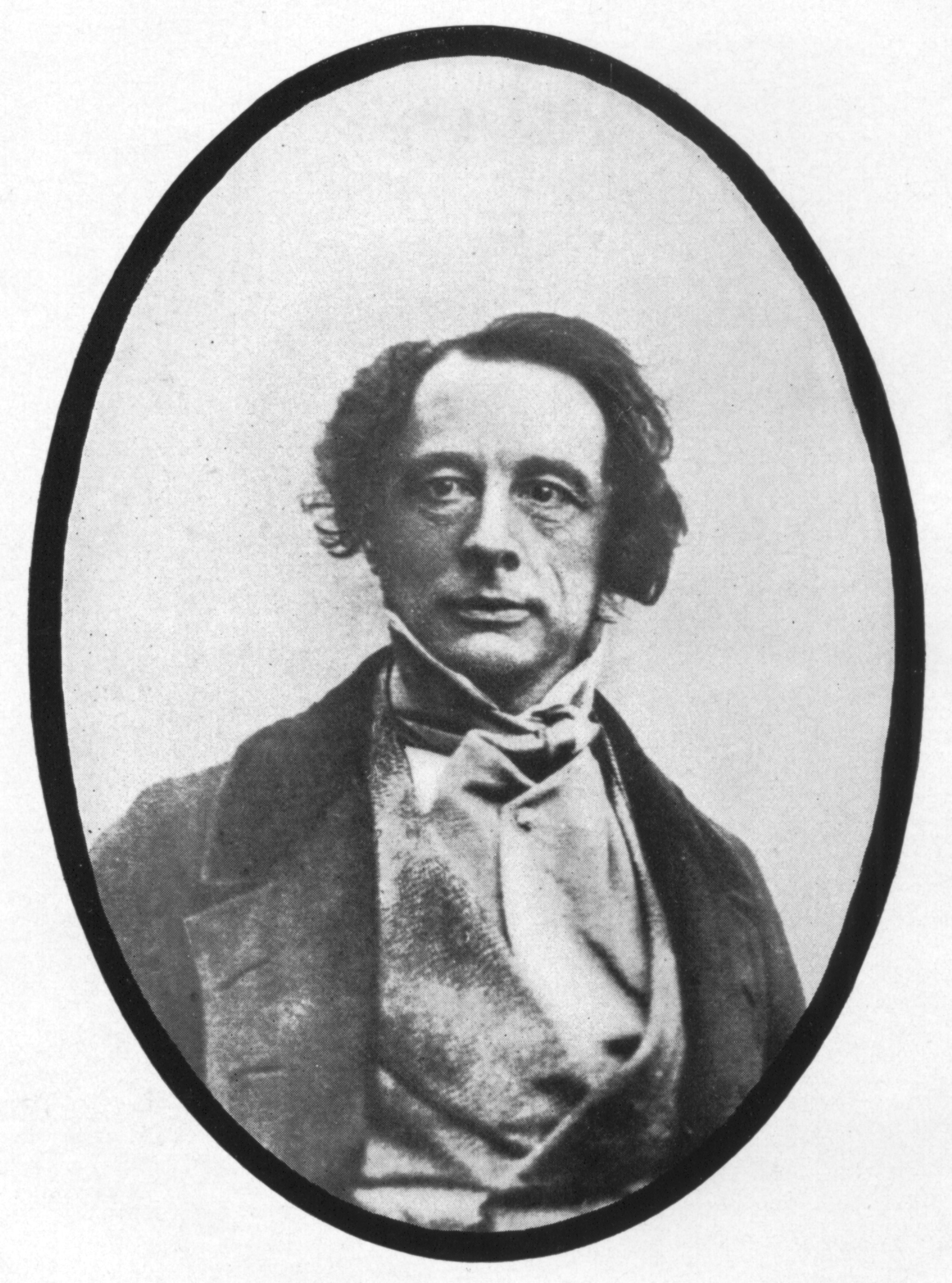 Poträtfoto von Charles Dickens